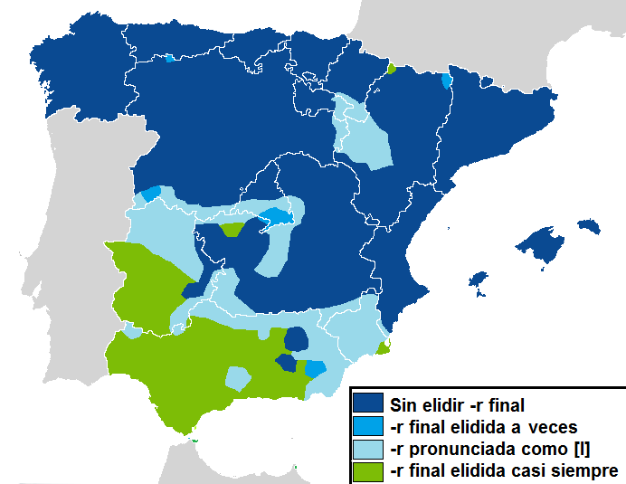 Elusión de la -r en el español de Europa.